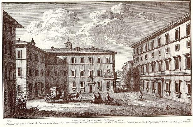 La Chiesa di Santa Lucia alle Botteghe Oscure in una incisione.